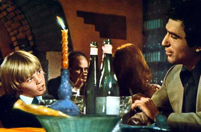 Una scena del film L'ultima neve di primavera (1973)